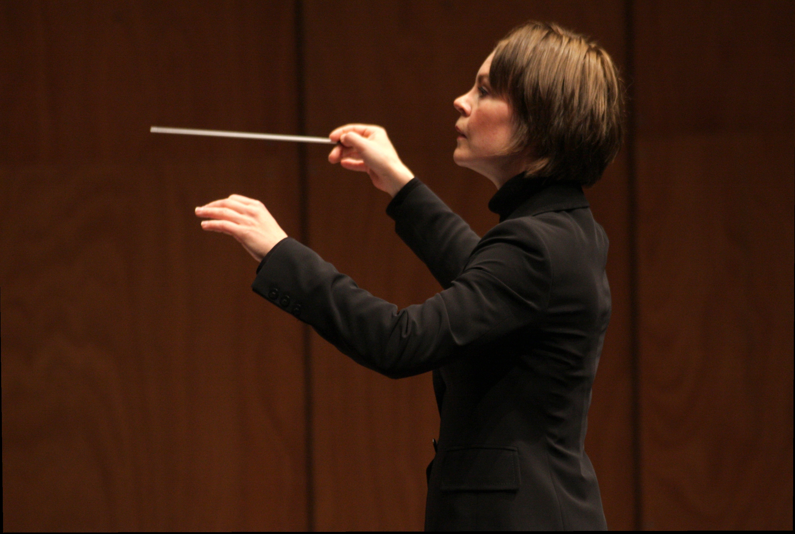 Palavela, 18 settembre 2008 Ensemble intercontemporain Susanna Mälkki, direttore